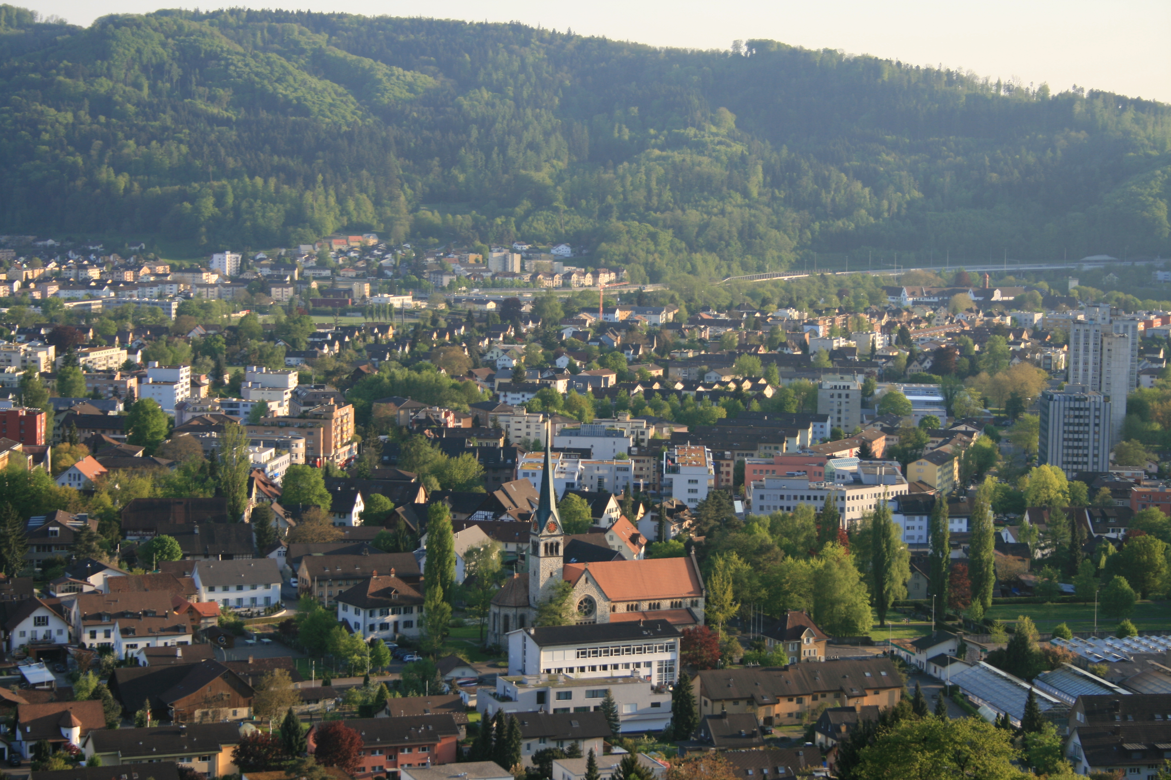 Blick auf den alten Dorfkern (mit der St.-Sebastian-Kirche) von Wettingen, Schweiz